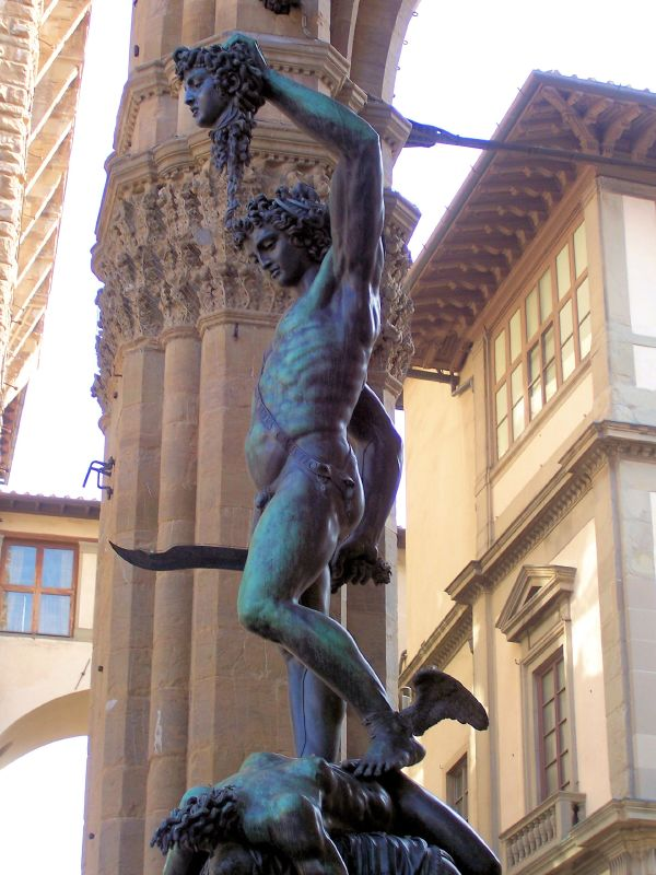 Persée et Méduse, Piazza Della Signoria, Firenze, Italia